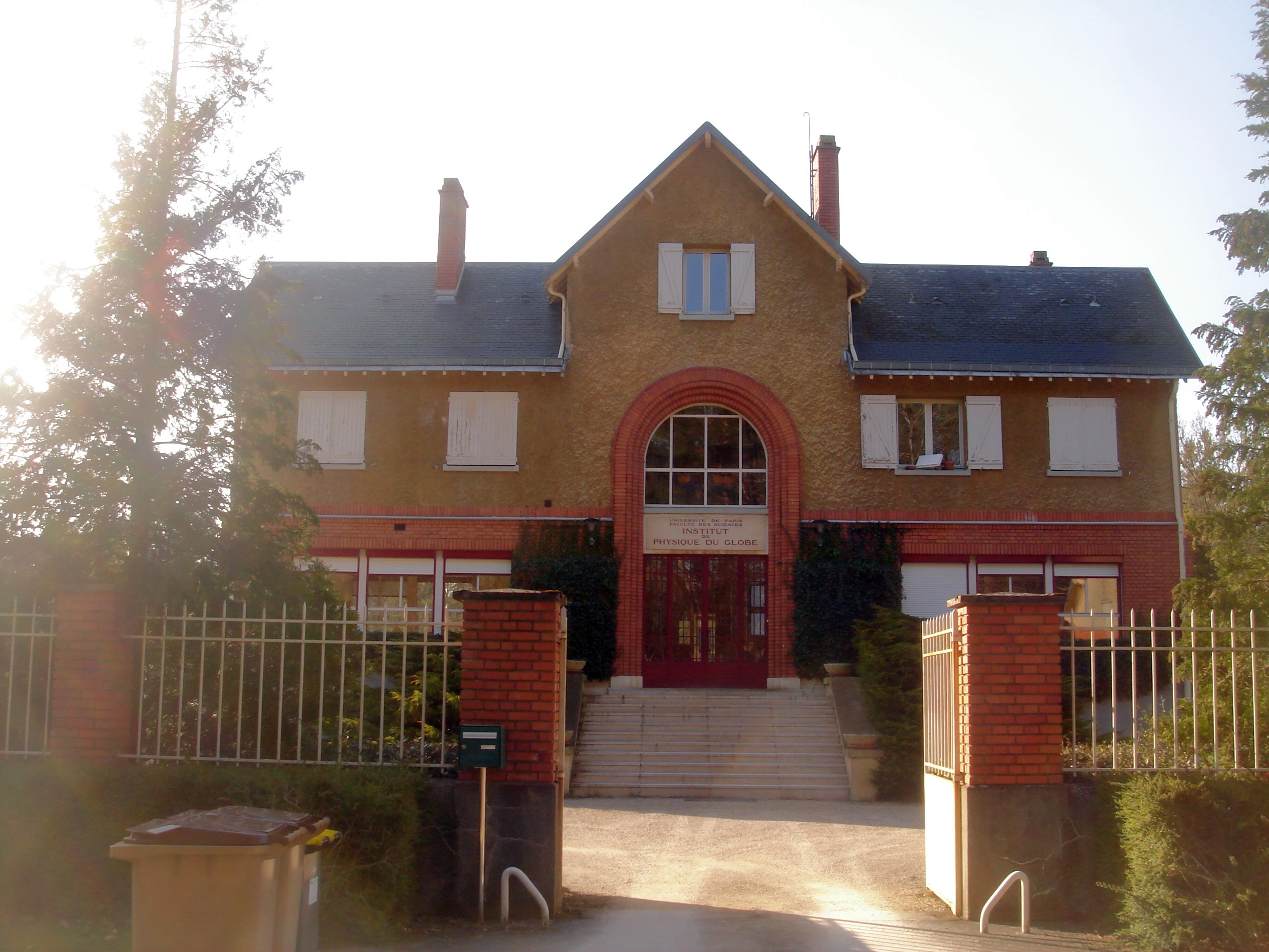 L'observatoire magnétique national de Chambon-la-Forêt dans la forêt d'Orléans dépendant de l'institut de physique du globe de Paris de l'université de Paris VI, Loiret, Centre, France